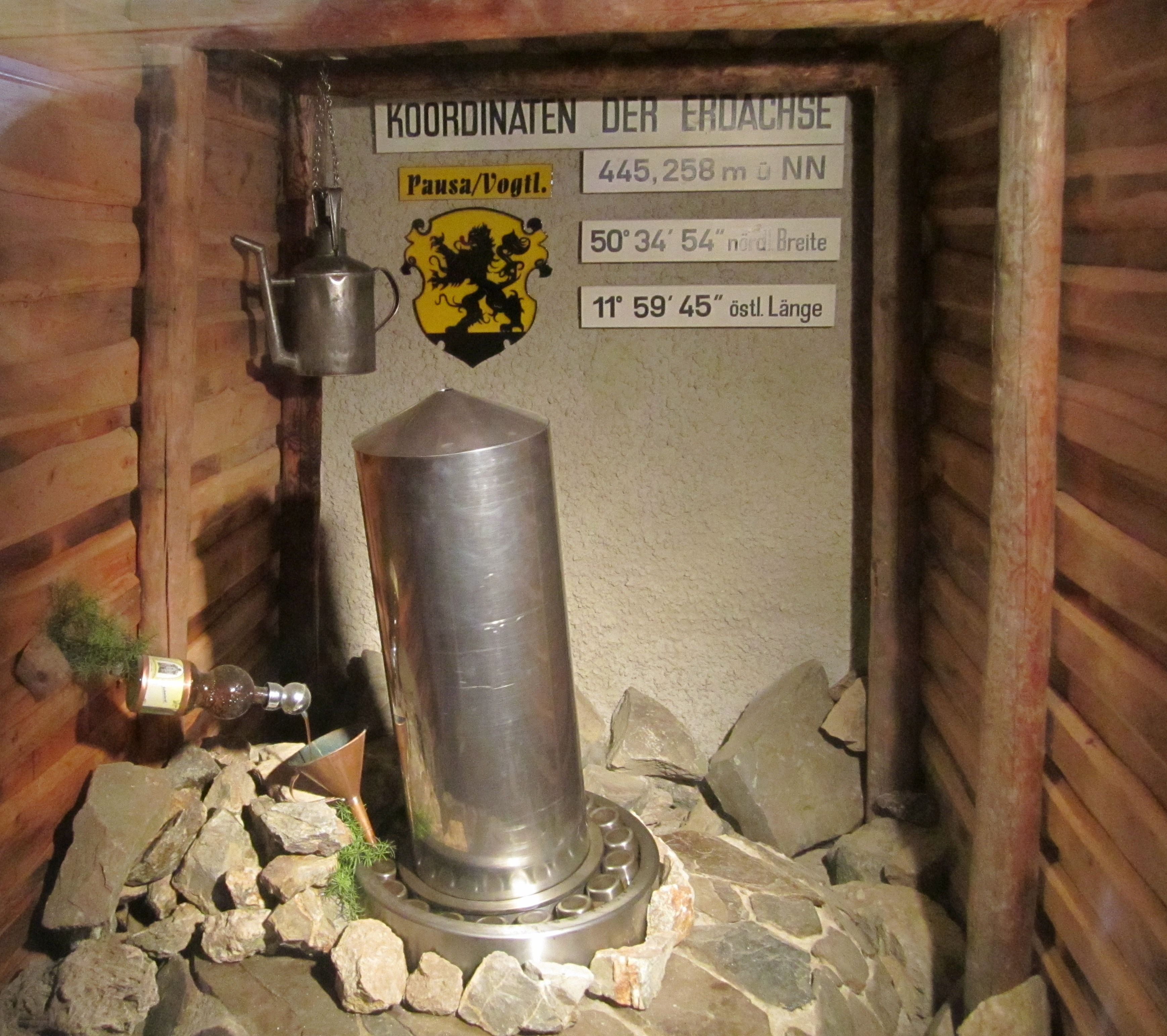 Das sich drehende Ende der Erdachse in Pausa, Sachsen, Deutschland.